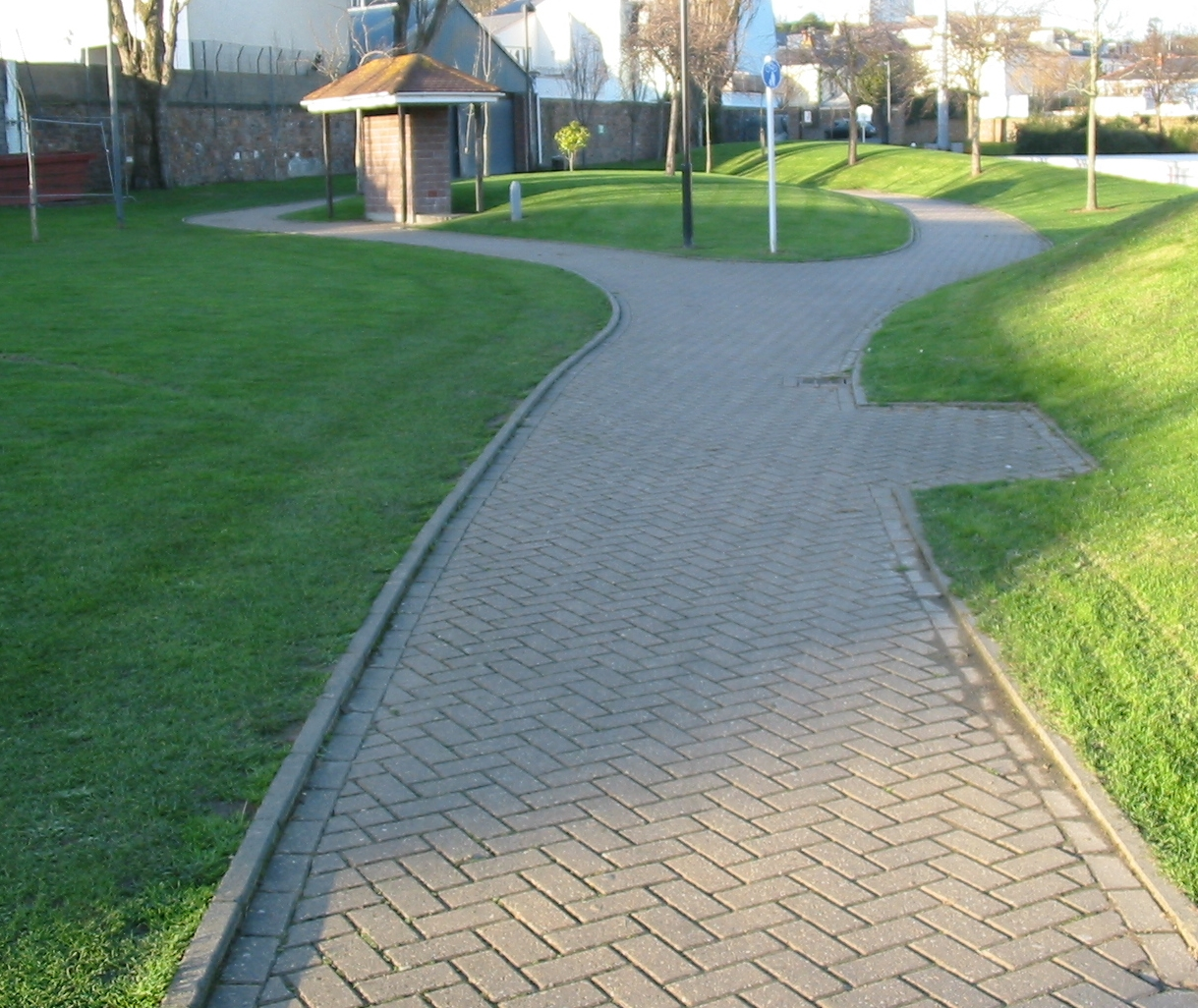 Springfield